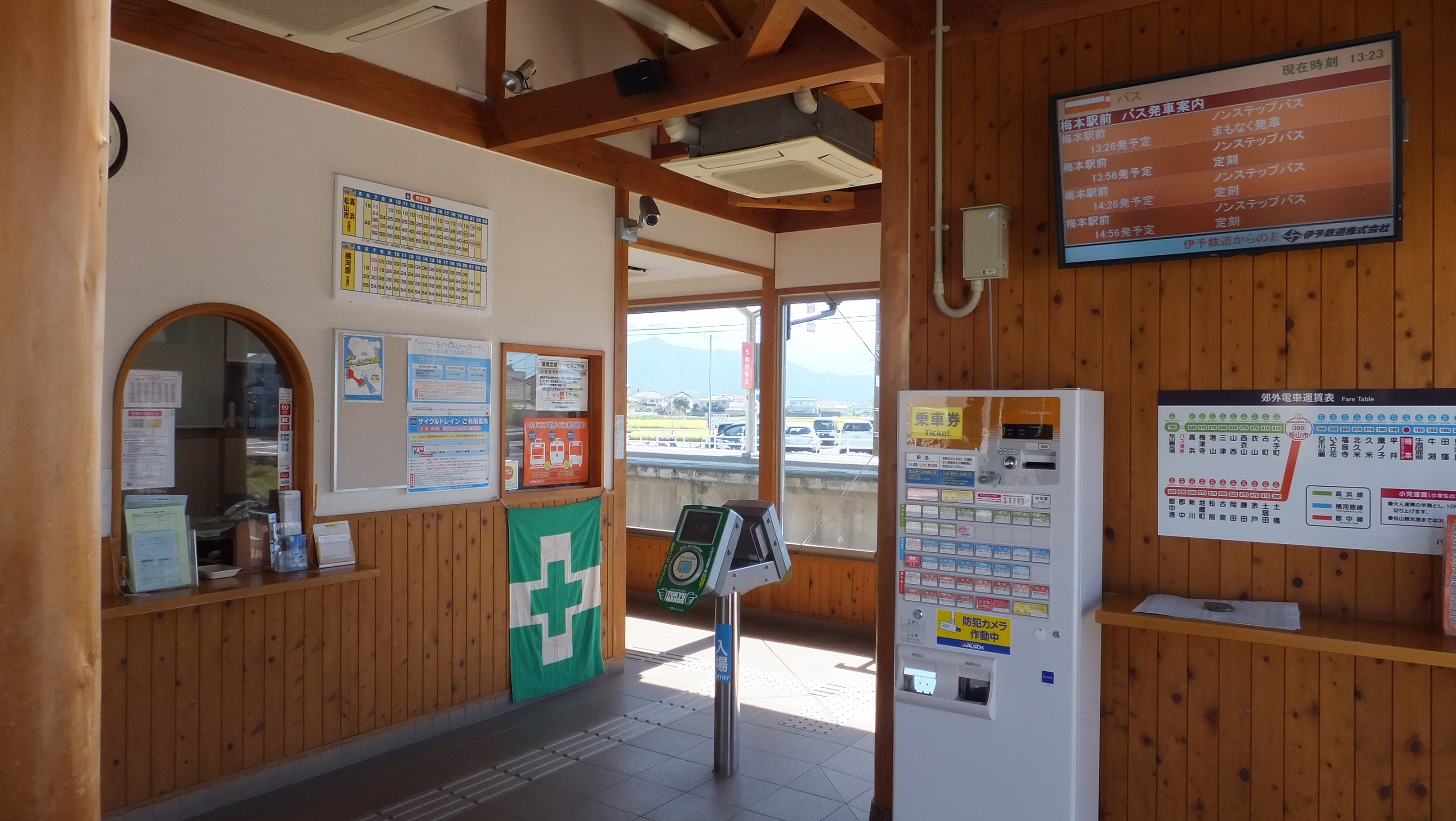 伊予鉄道 横河原線 梅本駅 （愛媛県松山市）2015年10月